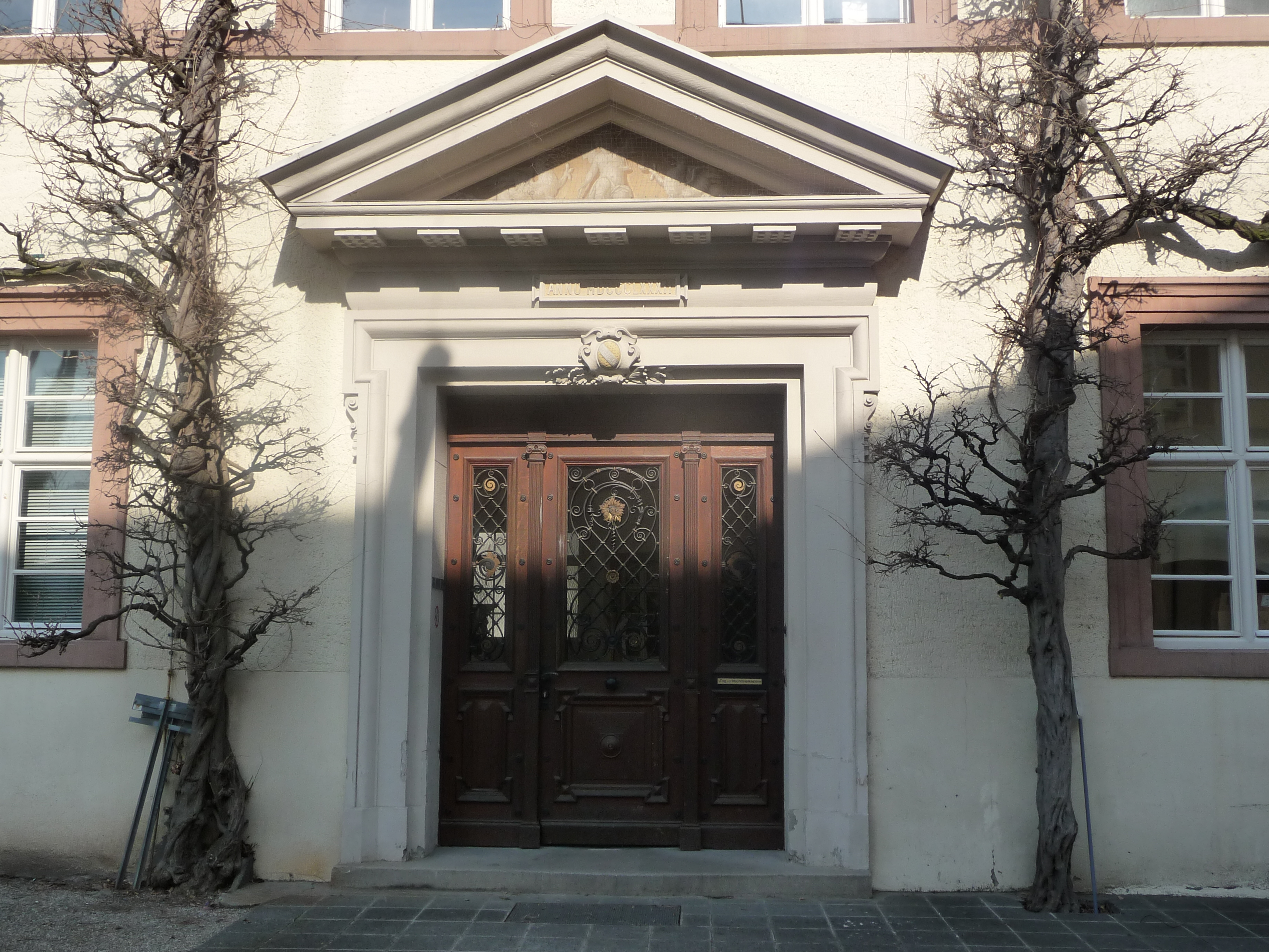 Portal im Innenhof des Rathauses in Baden-Baden (Baden-Württemberg, Deutschland)